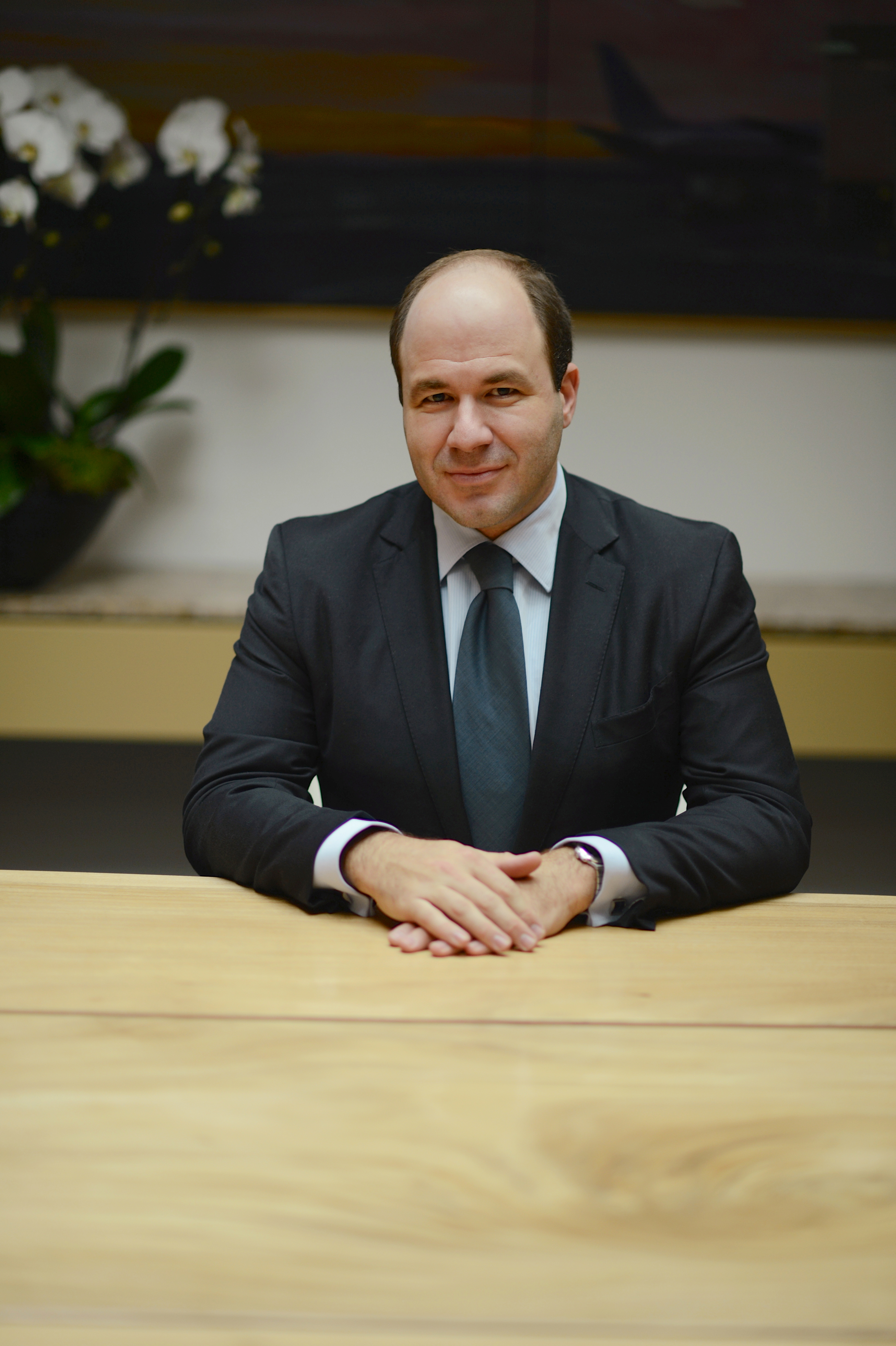 Cyril F. Benoit, Président de Benoit & Associés